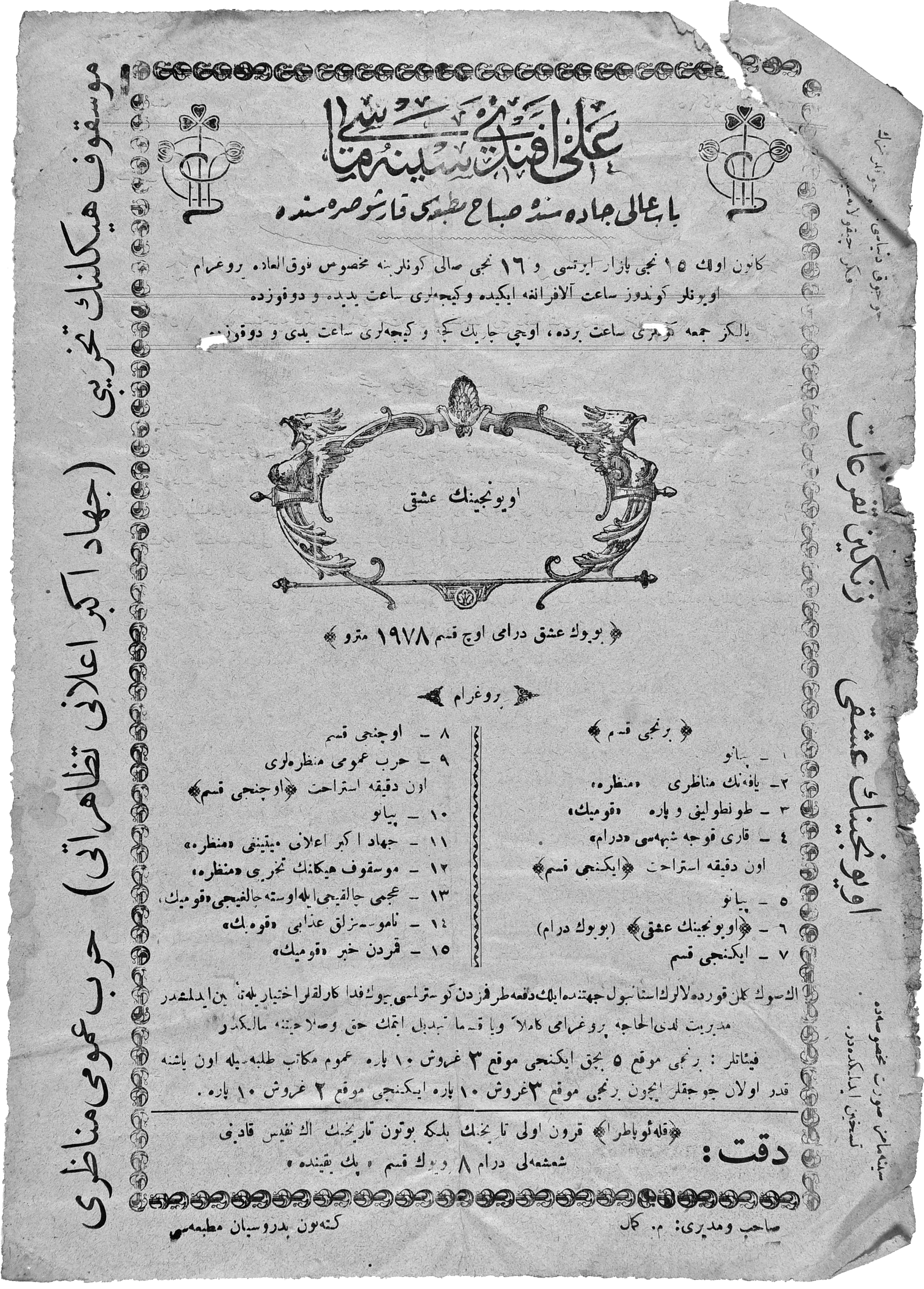 Sinema Haberleri gazetesinde Ali Efendi Sinemasının 28 Aralık 1914 gösterim programı. Programda şu filmler listeleniyor: "[Birinci Kısım] 1 – Piyano 2 – Yafa’nın Menâzırı “manzara” 3 – Tontolini ve Para “komik” 4 – Karı Koca Şüphesi “dram” On dakika istirahat [İkinci Kısım] 5 – Piyano 6 – Oyuncunun Aşkı (büyük dram) 7 – İkinci kısım 8 – Üçüncü kısım 9 – Harb-i Umumi manzaraları On dakika istirahat [Üçüncü Kısım] 10 – Piyano 11 – Cihad-ı Ekber İlanı Mitingi “manzara” 12 – Moskof Heykelinin Tahribi “manzara” 13 – Acemi Çalgıcı ile Usta Çalgıcı “komik” 14 – Namussuzluk Azabı “komik” 15 – Kamerden Haber “komik”"